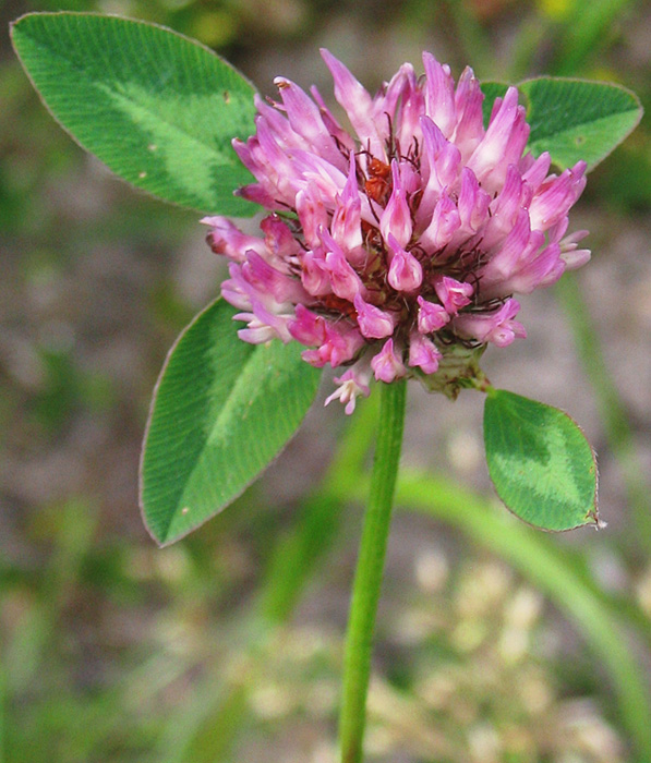 Beschreibung: gemeiner roter Kopfklee - Rotklee (Trifolium pratense L.) Fotograf: Darkone, 16. Juni 2005